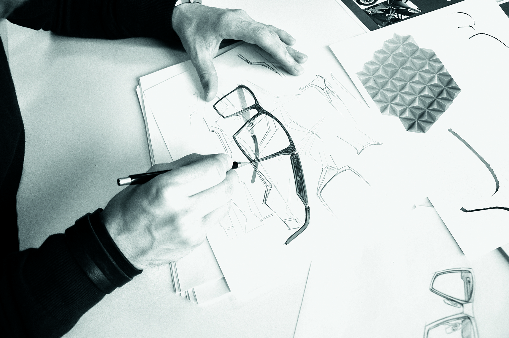 croquis d'une monture Ad Lib réalisé par un designer Charmant France